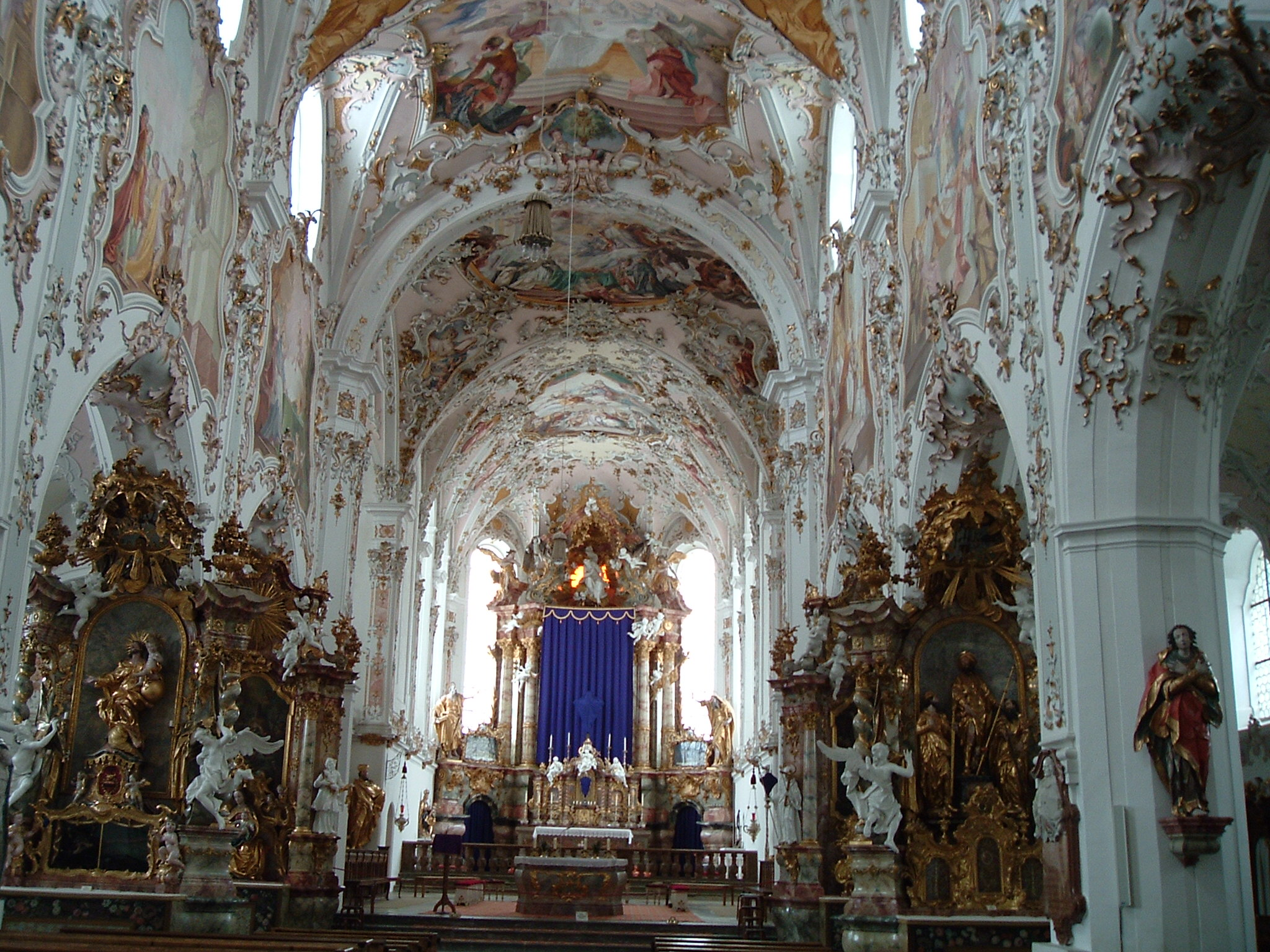 Rottenbuch, ehem. Klosterkirche: Altäre Deckenstuck von Franz Xaver Schmuzer, 1741–1745 Fresken von Matthäus Günther